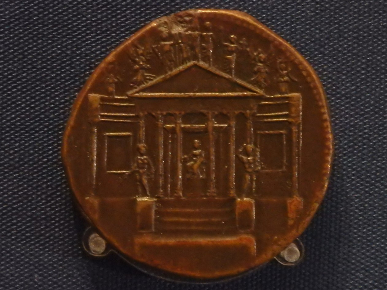 Concordiatempel auf Sesterz Kaisers Tiberius', Kampmann 5.15, RIC 55